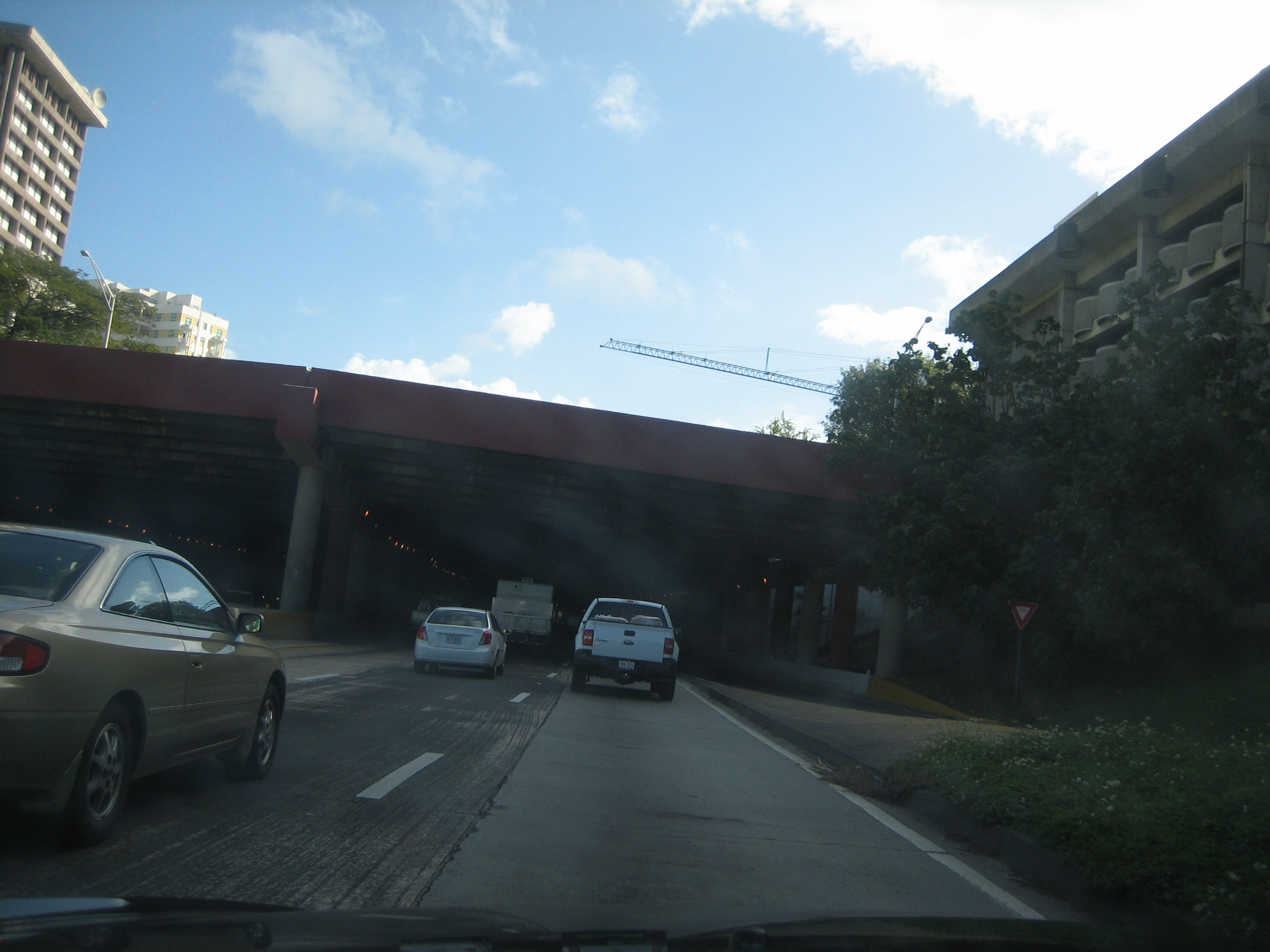 Carretera 22